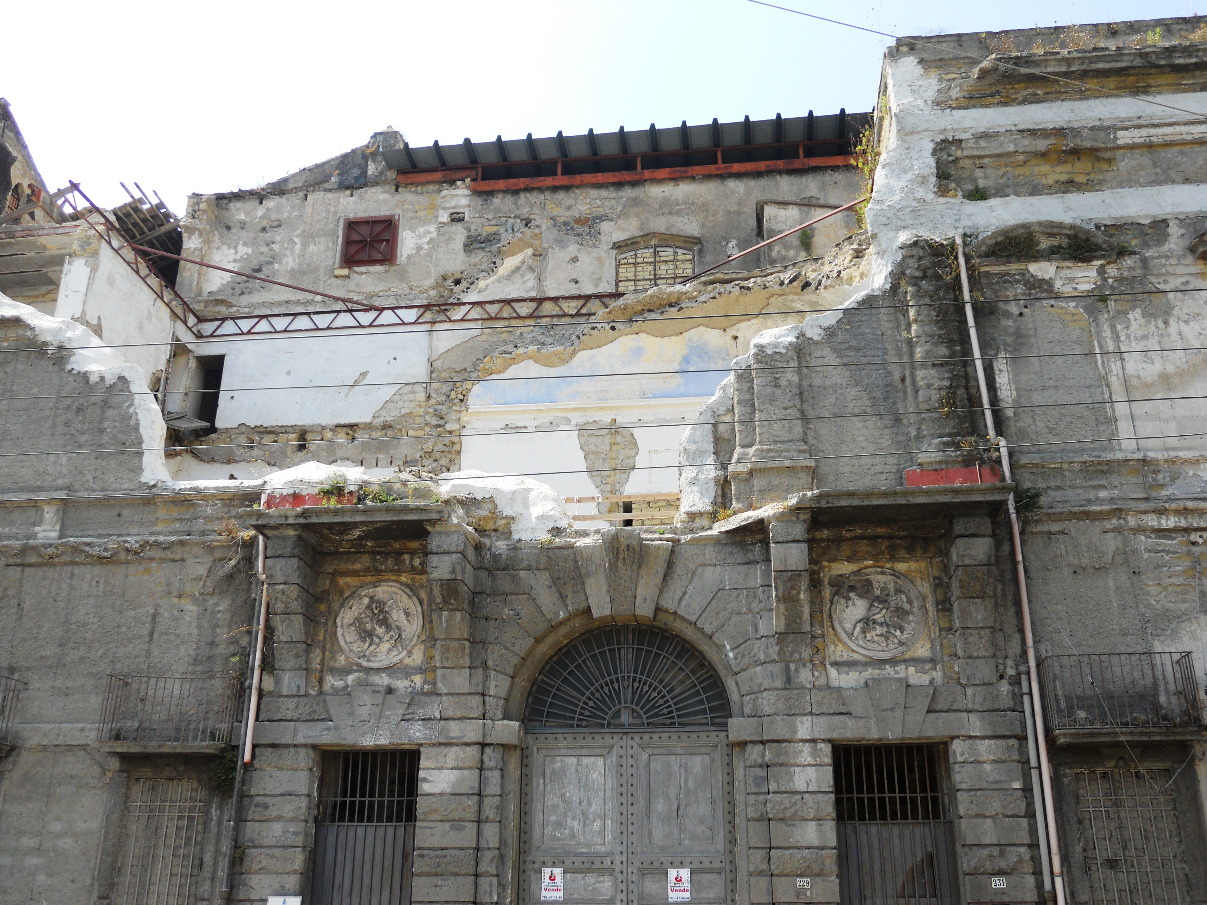 Palazzo Lauro Lancellotti crollato